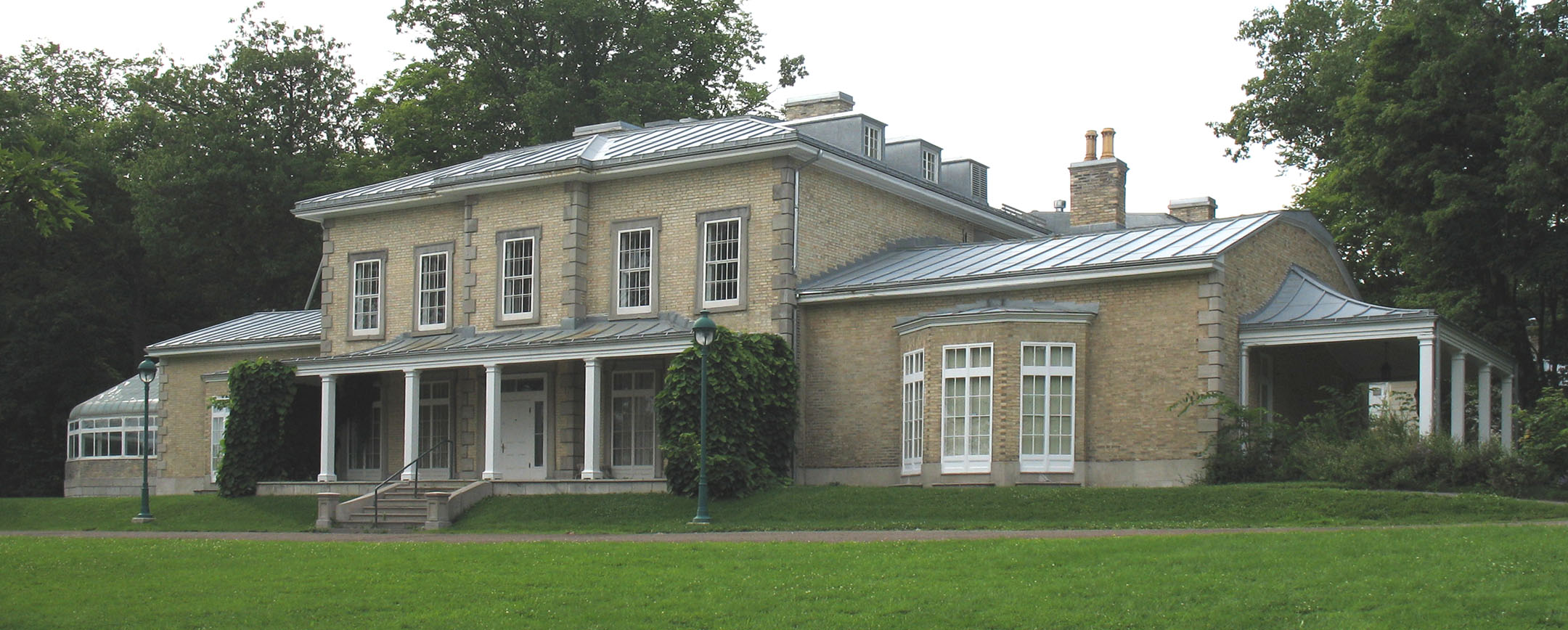 Domaine Cataraqui propriété située à Québec dans le quartier Sillery de l'arrondissement Sainte-Foy–Sillery–Cap-Rouge. Province de Québec. Canada